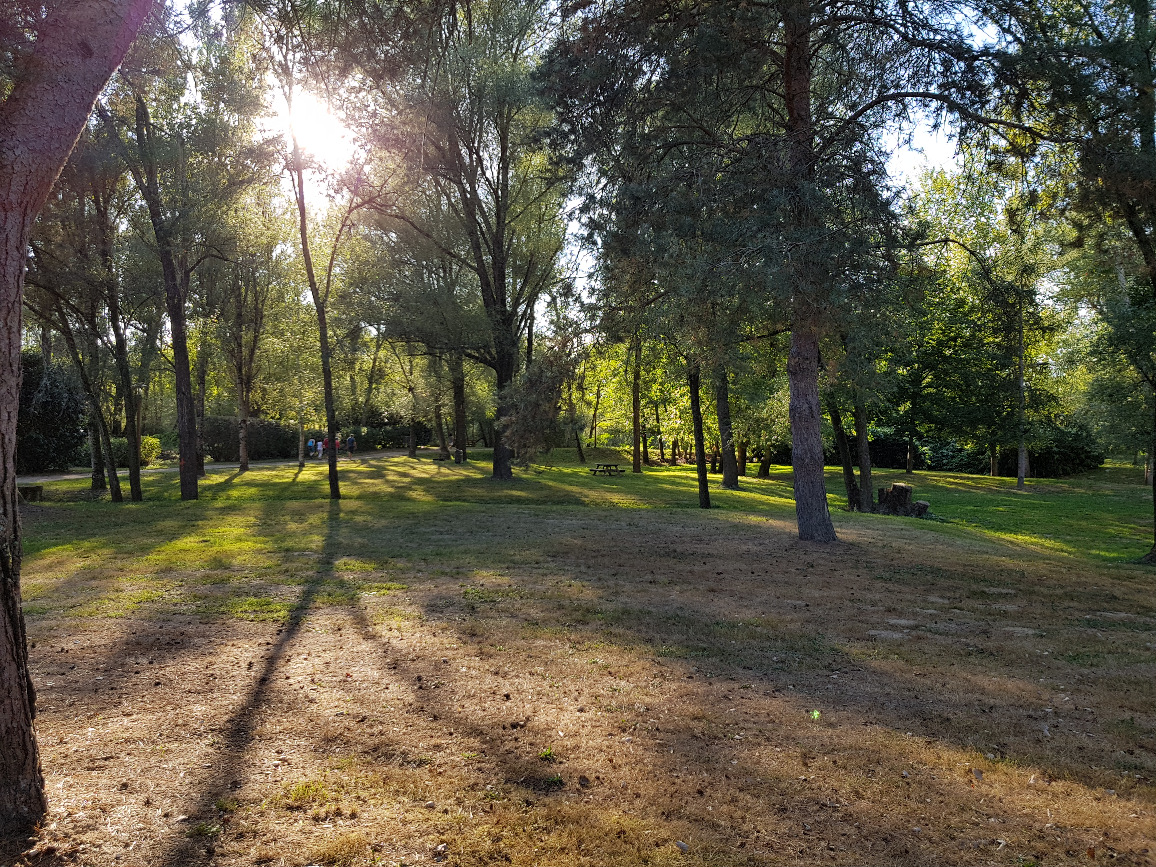 Parc de jogging d'ILOA à Thiers